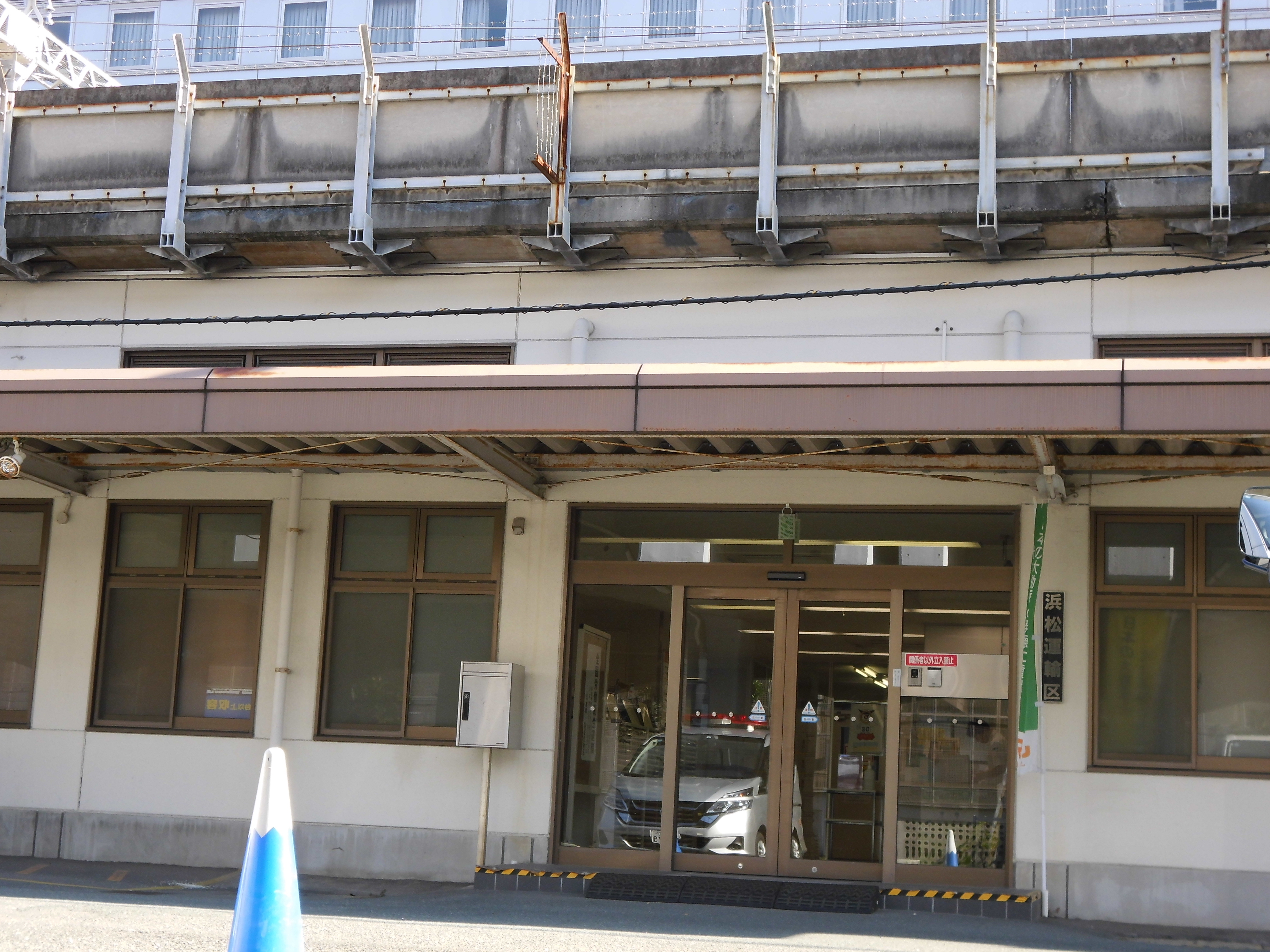 JR東海静岡支社に属する乗務員区所の浜松運輸区、東海道新幹線高架下に入居する